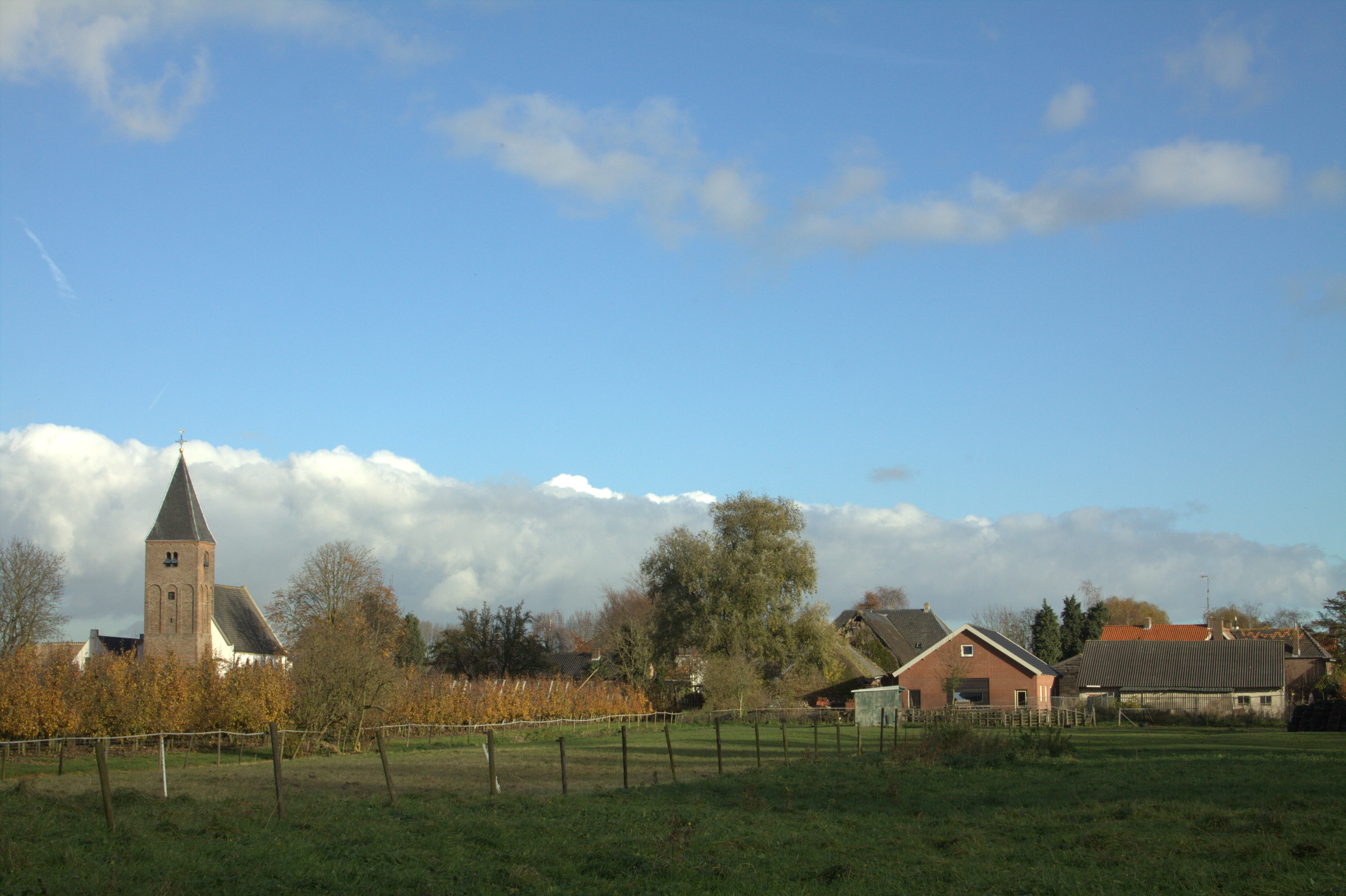 Dorpsgezicht van Meteren vanaf de Achtersteweg.